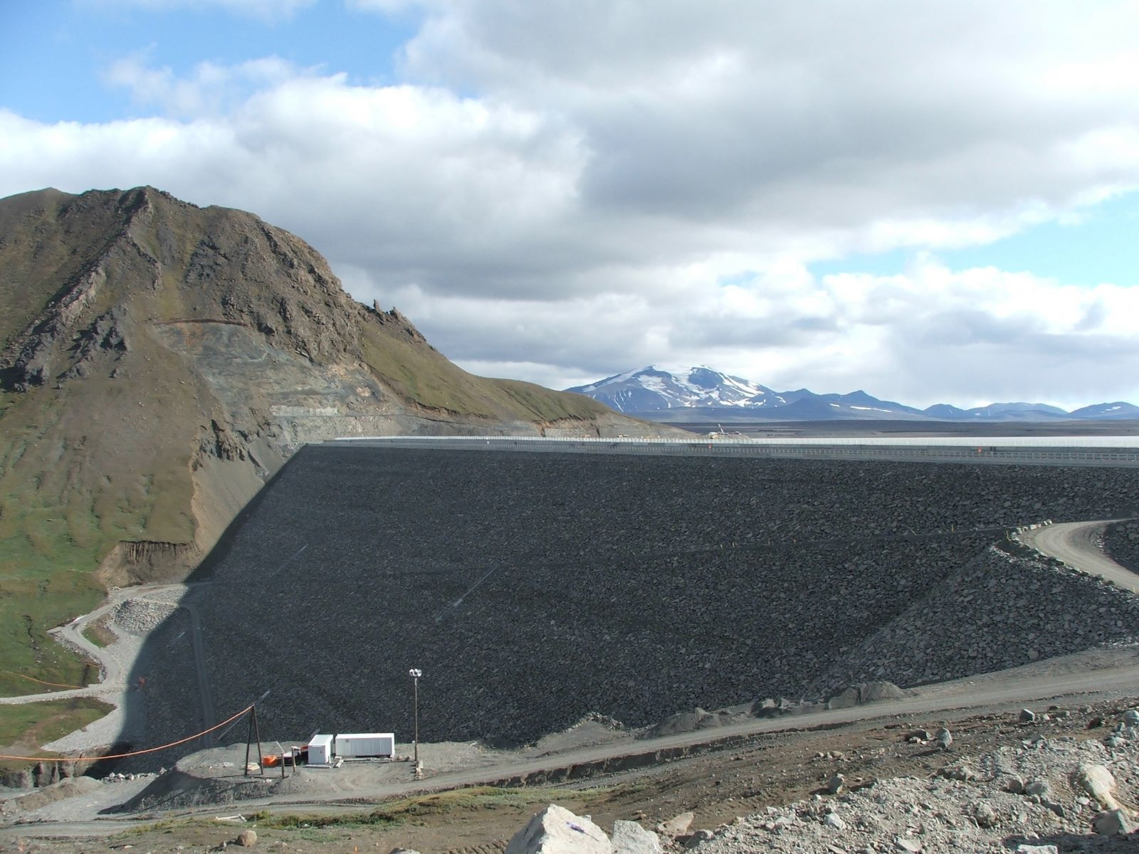 Kárahnjúkar Staudamm